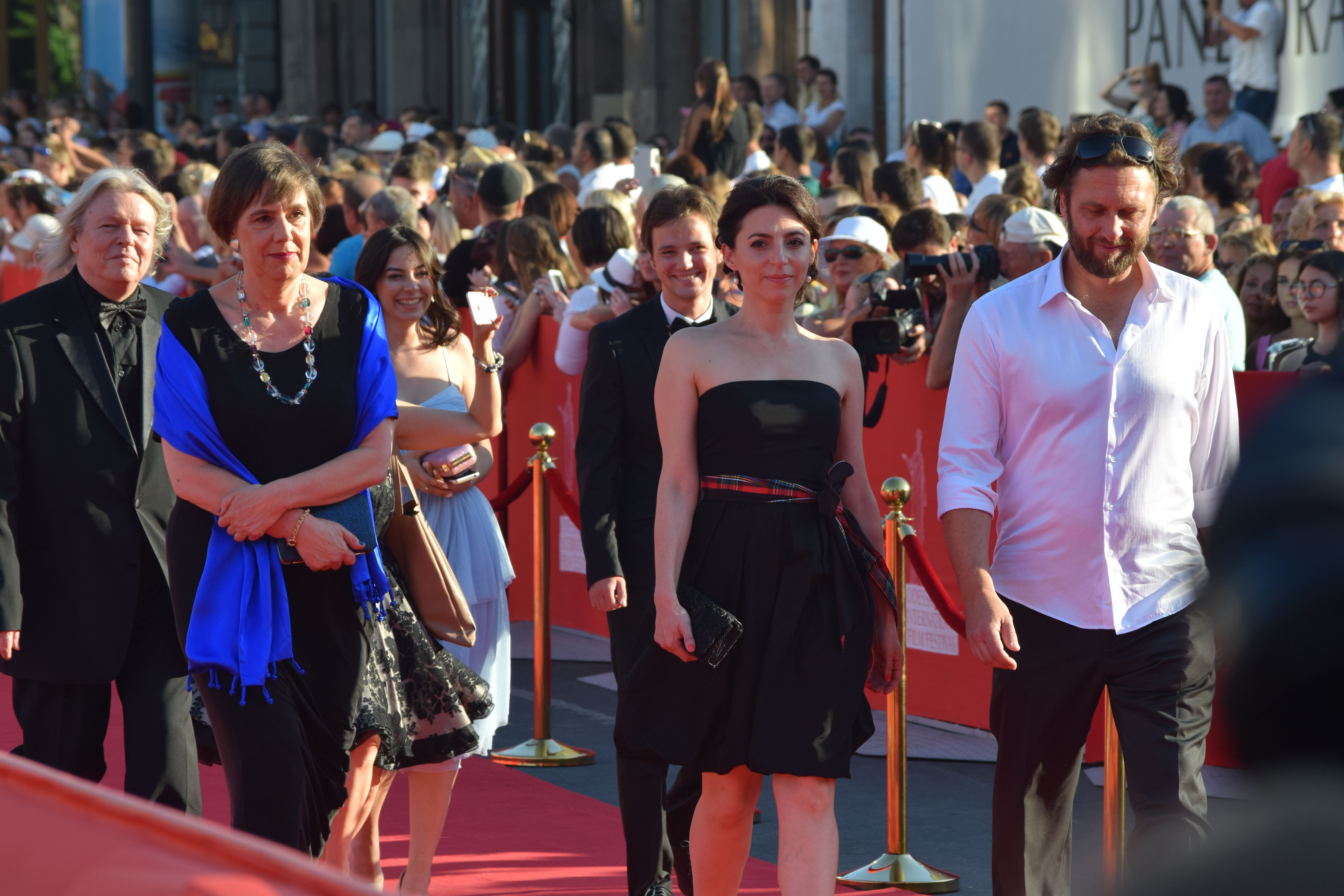 Кристофер Хэмптон, Ребекка О'Брайен, Ева Нейман на открытии 7-го Одесского международного кинофестиваля.